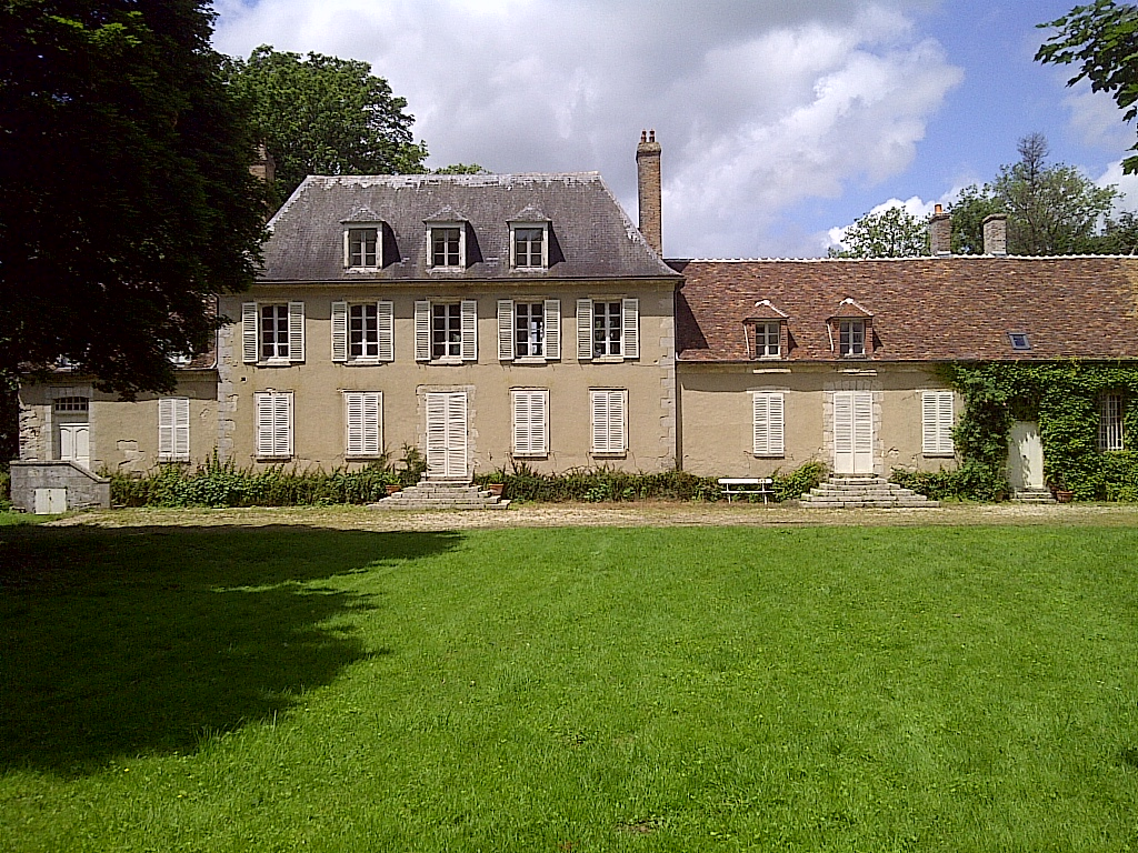 Le château du Pin, Mérinville, Loiret, Centre, France